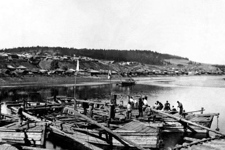 Загрузка барки на р. Чусовой. Кын (фото конца XIX в.)